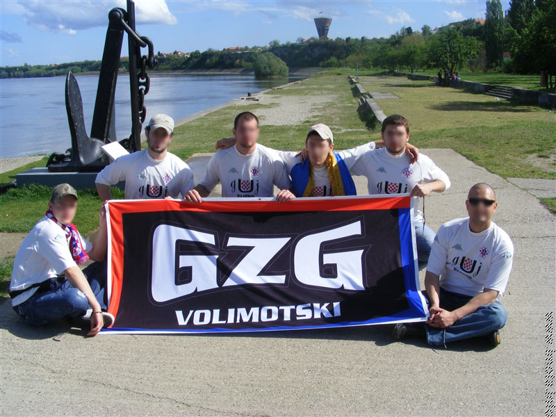 GZG u Vukovaru